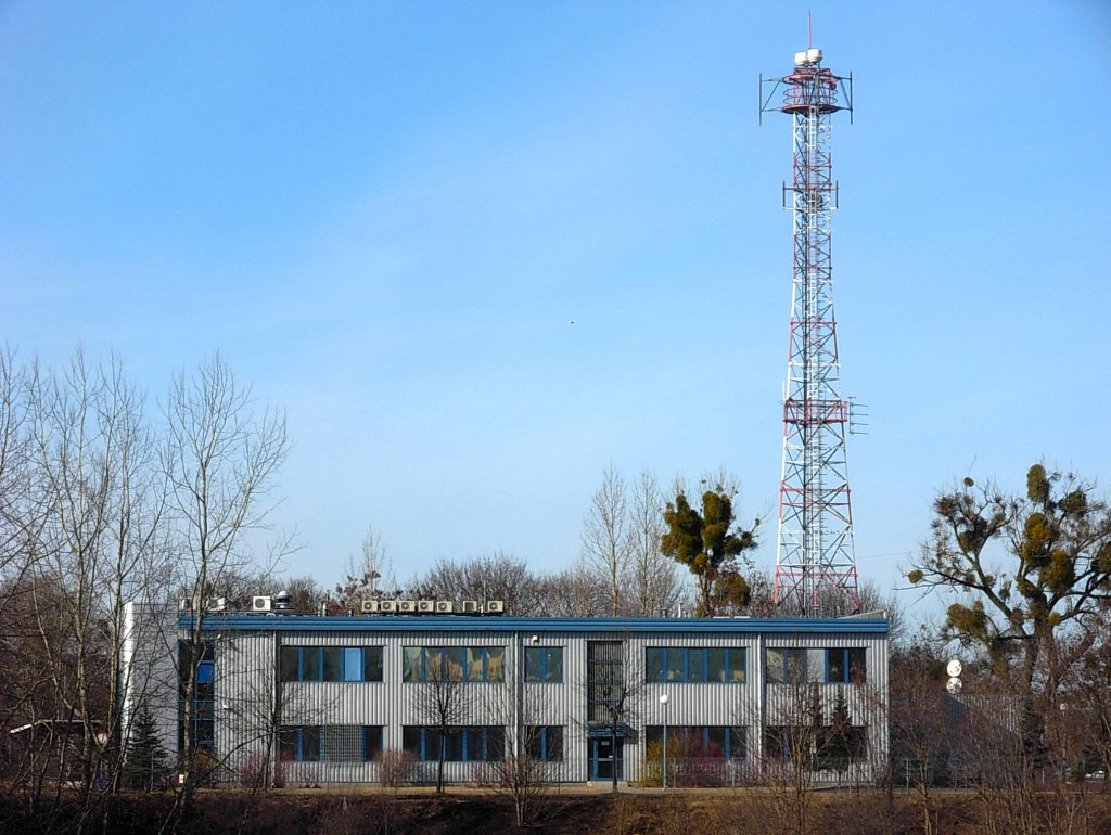 Budynek Oddziału Bydgoszcz Telewizji Polskiej przy ul. Kujawskiej 7